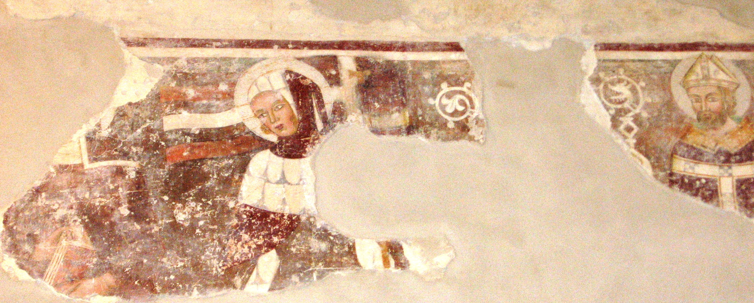 Cortemilia. Chiesa del Convento francescano. Frammento di affresco gotico, ascrivibile al XIV/XV secolo. Sono visibili i volti due figure e elementi di altre tre.